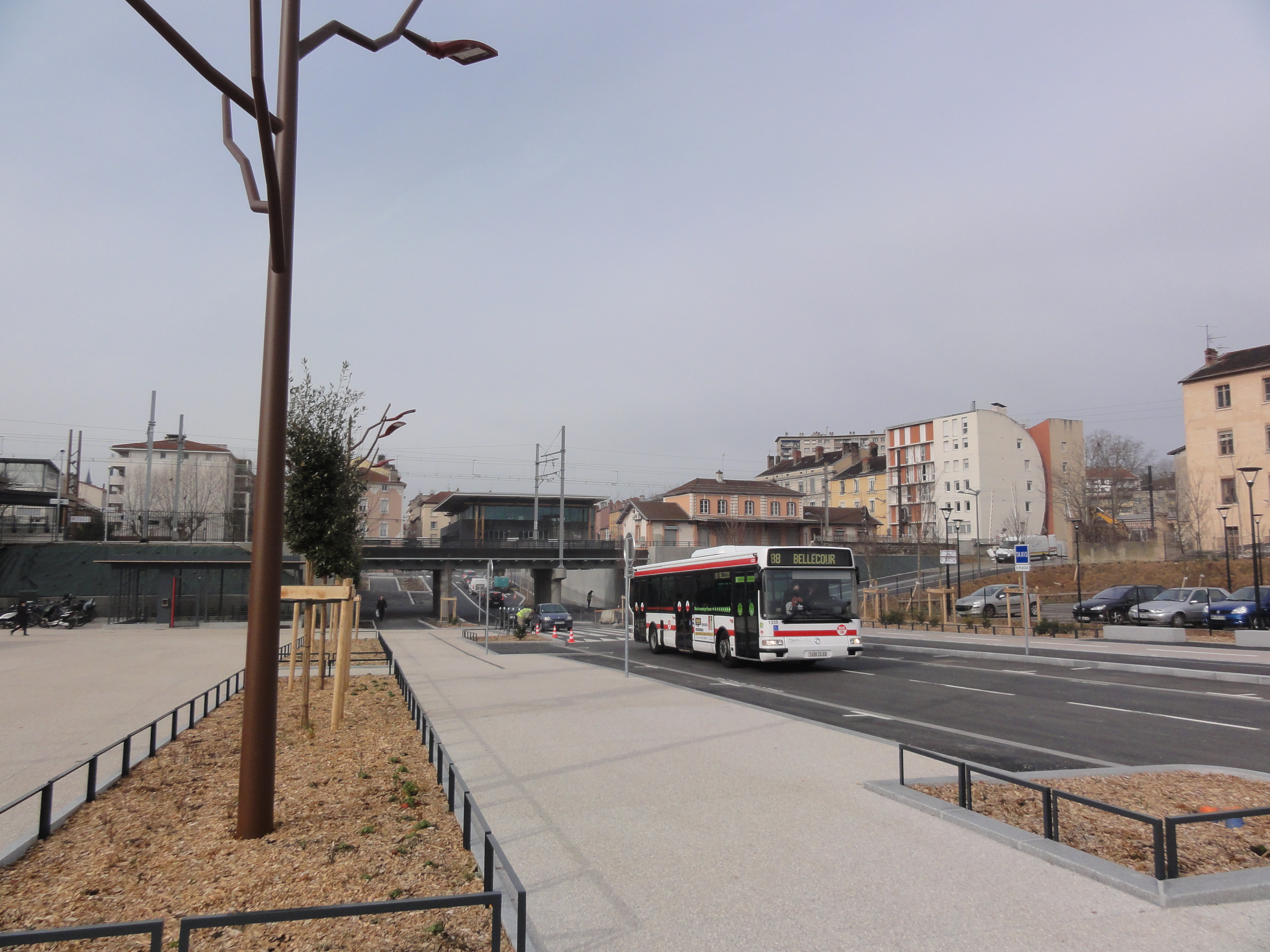 Avenue du Rhône desservant le pôle multimodal et la station de métro